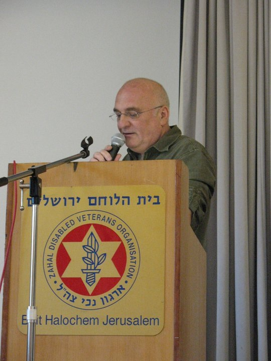 המשורר פיני רבנו נושא דברים בבית הנלוחם